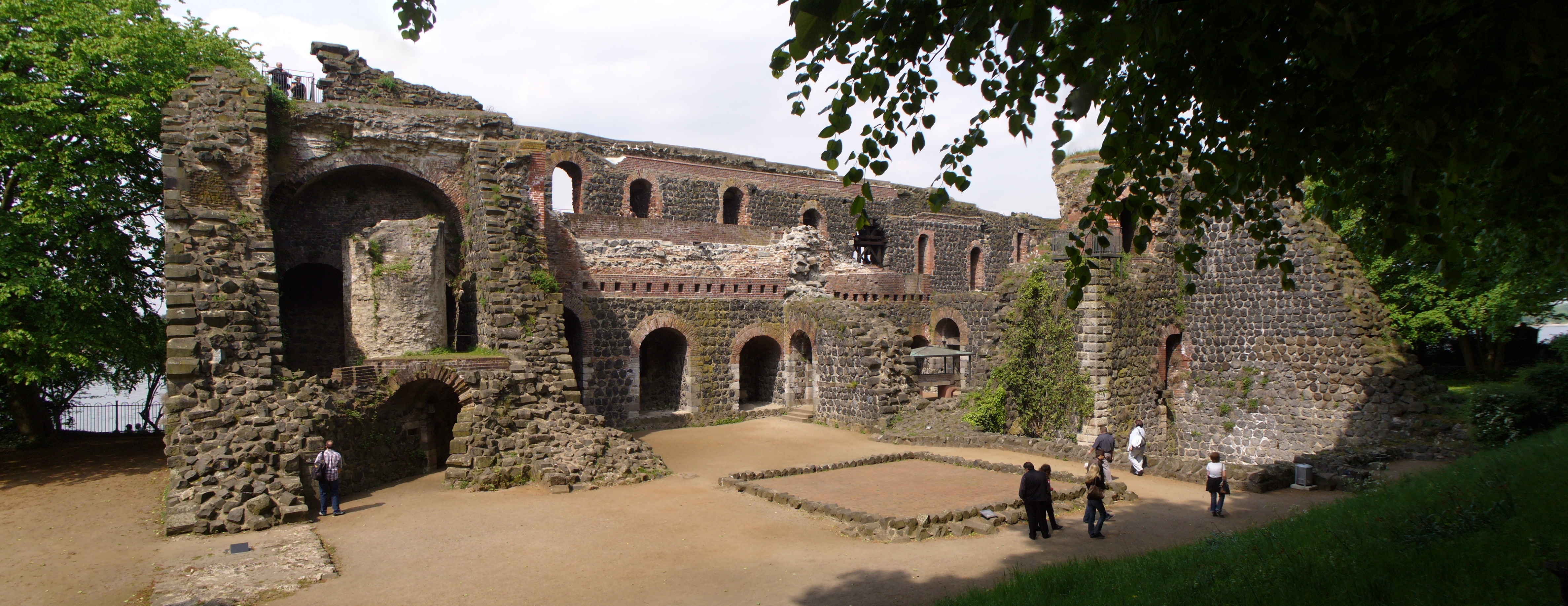 Ruine der Kaiserpfalz in Kaiserswerth